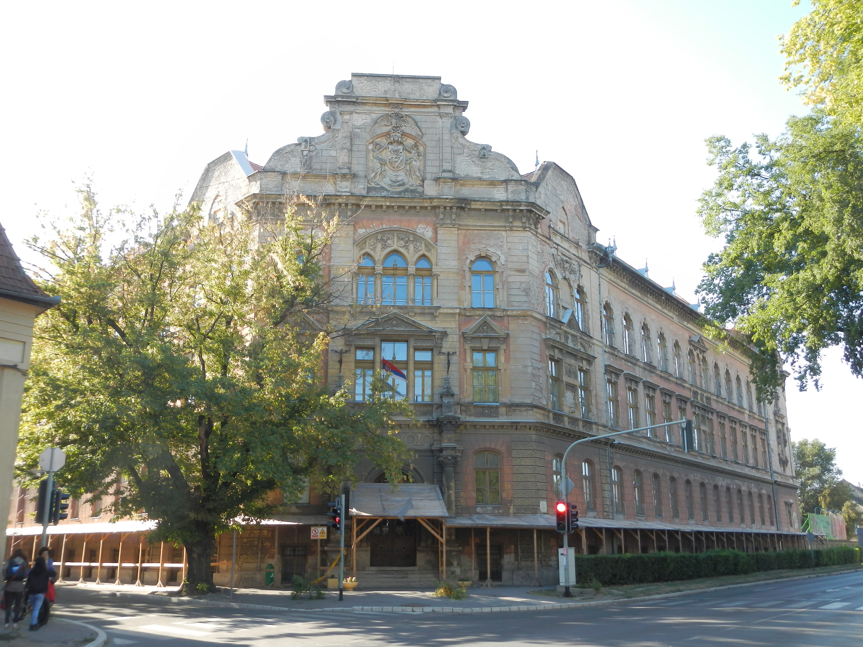 Јанош Бабула је у периоду од 1893. до 1894. године урадио пројекат за овај објекат, а суботички архитекта Титус Мачковић га је прилагодио за потребе Учитељске школе која је завршена 1898. године. Између два светска рата у згради је био смештен Правни факултет, а од 1945. године у њој се налази Техничка школа. Изграђена је у стилу еклектике.